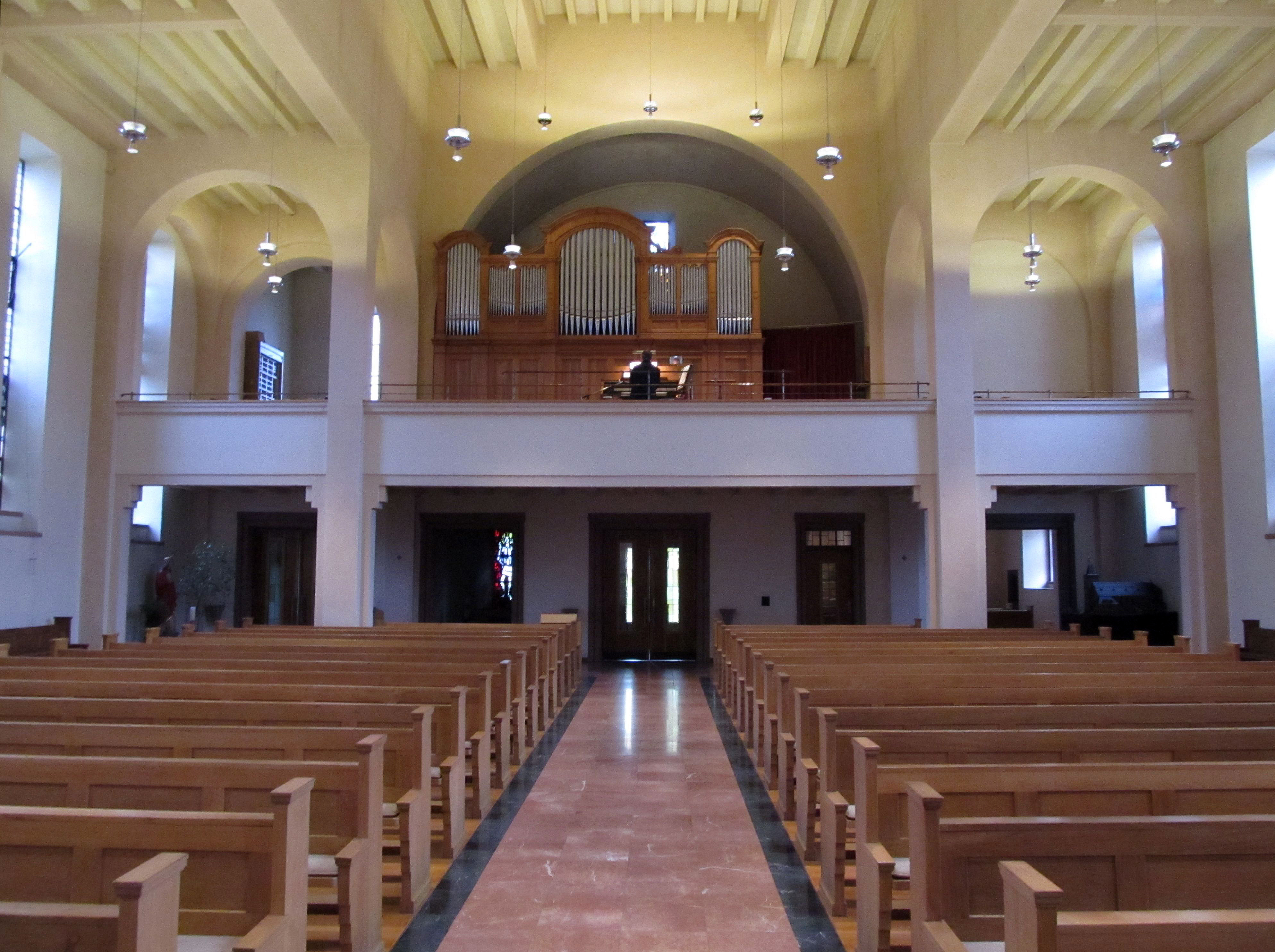 Blick ins Innere der katholischen Pfarrkirche Herz Jesu in Wustweiler, einem Ortsteil von Illingen, Landkreis Neunkirchen, Saarland